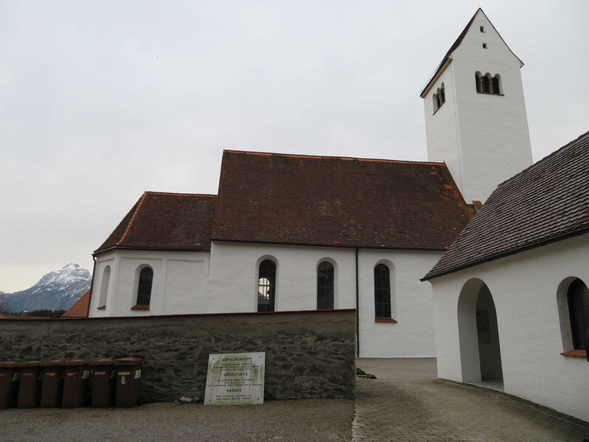 St. Peter und Paul in Hopfen am See ist eine barockisierte Kirche, deren Ursprünge wohl auf das 11. Jh. zurückgehen. Sie enthält gotische Fresken und Malereien von Claudius Schraudolph dem Älteren sowie Stuck von Joseph Fischer aus Faulenbach.